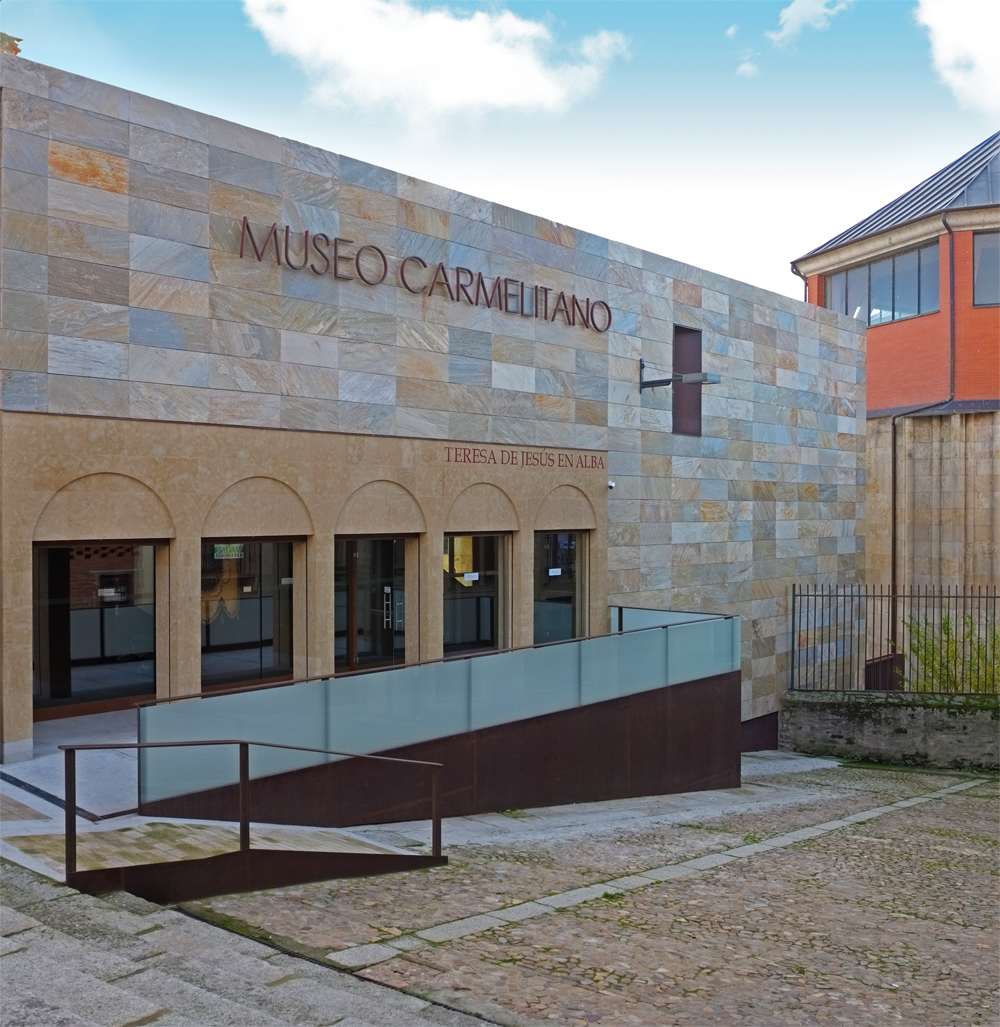 Facahada del Museo Carmelitano Alba de Tormes